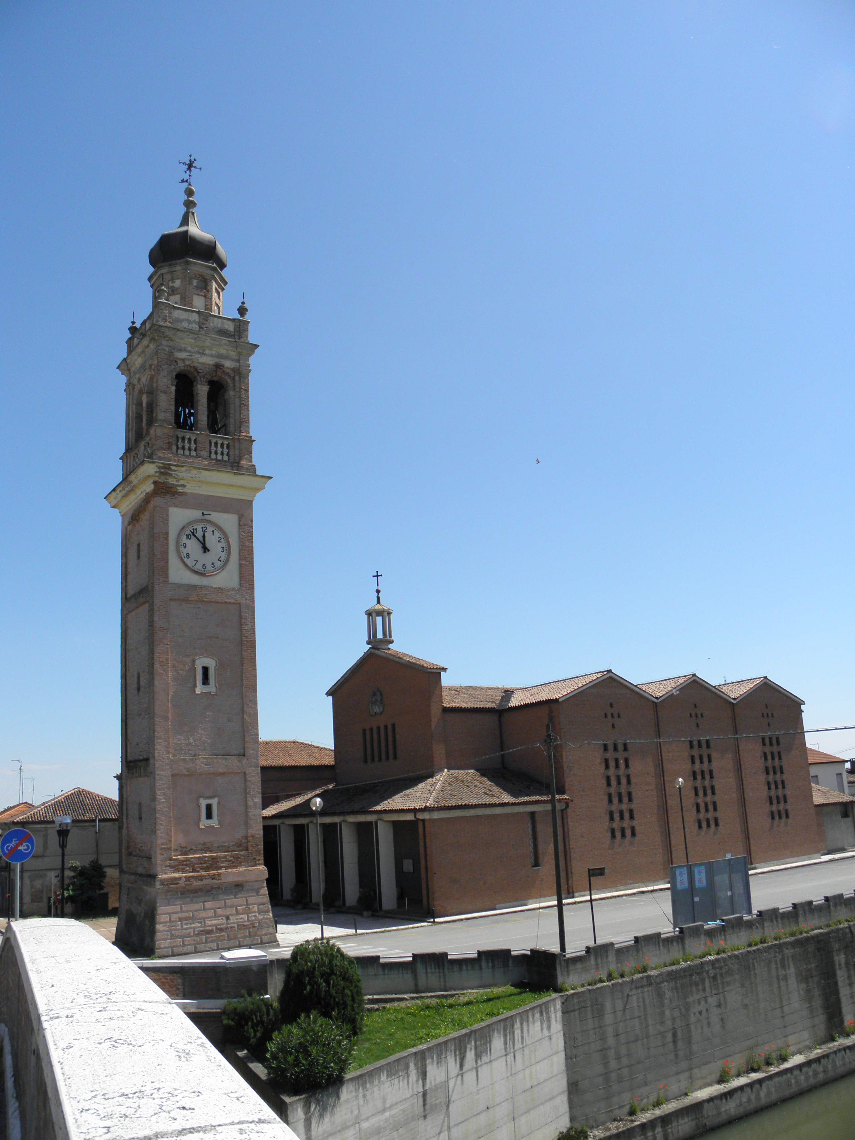 Zelo, frazione di Giacciano con Baruchella: la chiesta parrocchiale di Sant'Andrea apostolo vista dal ponte sul Fiume Tartaro.